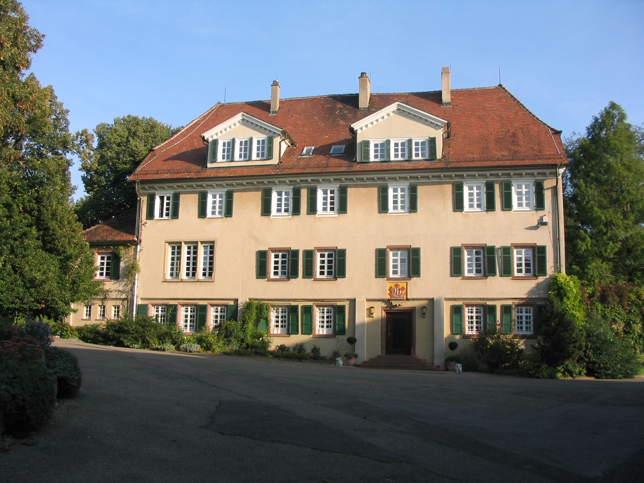 Herrenhaus Schloss Nippenburg